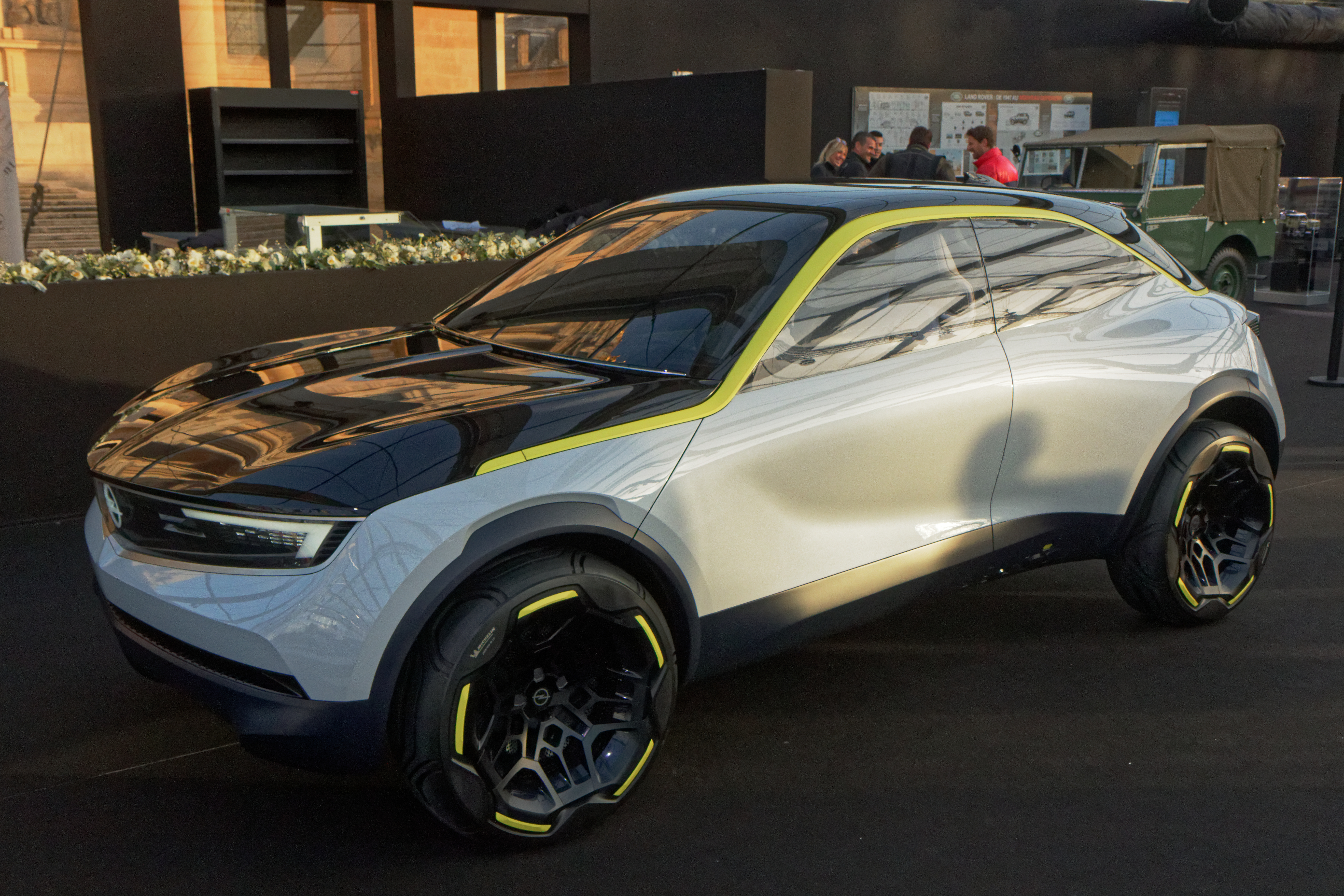 Une Opel GT X exposée lors du festival automobile international 2020